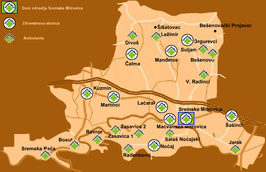 Слика приказује локације објеката Дома здравља Сремска Митровица на територији Града Сремска Митровица.